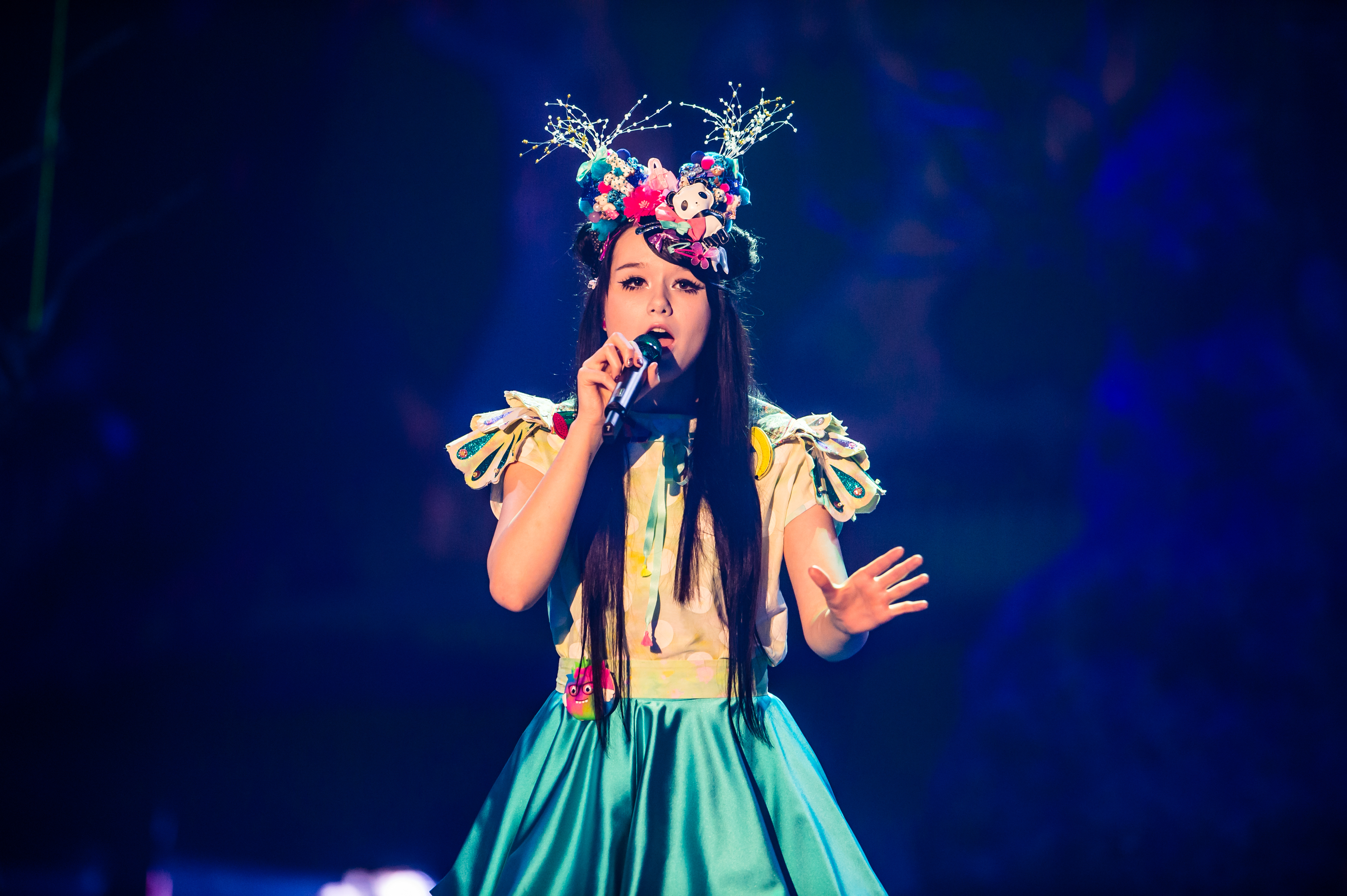 Eurovision Song Contest 2016 - Unser Lied für Stockholm - Jamie-Lee Kriewitz